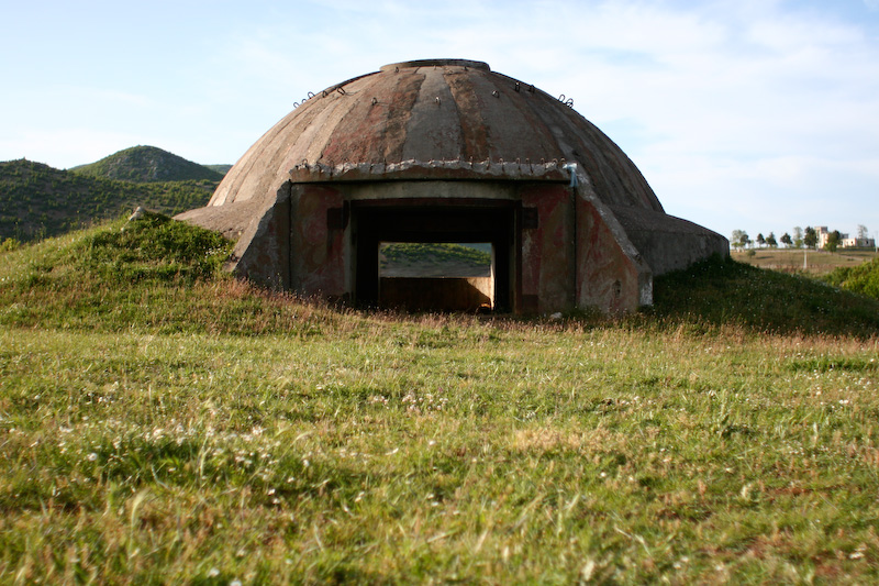 A bunker in Albania